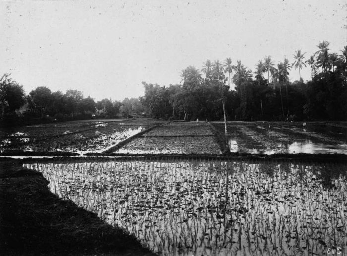 Foto. Natte of overstroomde sawah bij station Grati, Oost-Java